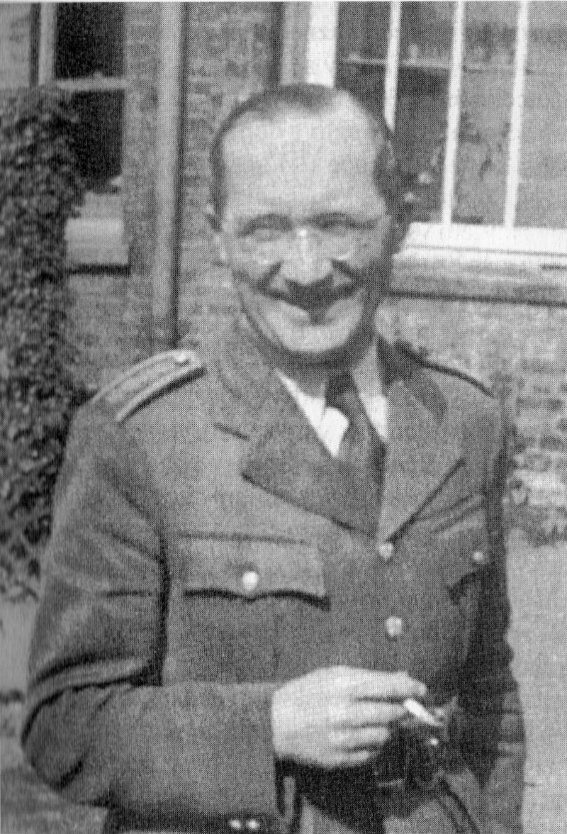 Čeněk Kudláček (* 1896 - 1967) byl československý generál, legionář, protinacistický a protikomunistický odbojář. Na fotografii v hodnosti plukovníka pravděpodobně před rokem 1946.